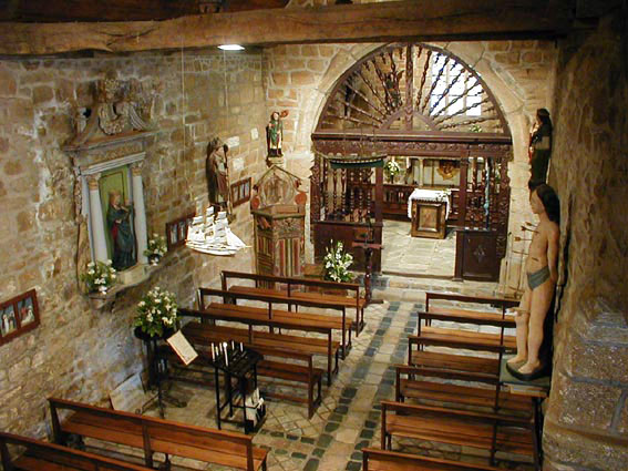 Perwenan. Porzh-Gwenn. Chapel. Nev